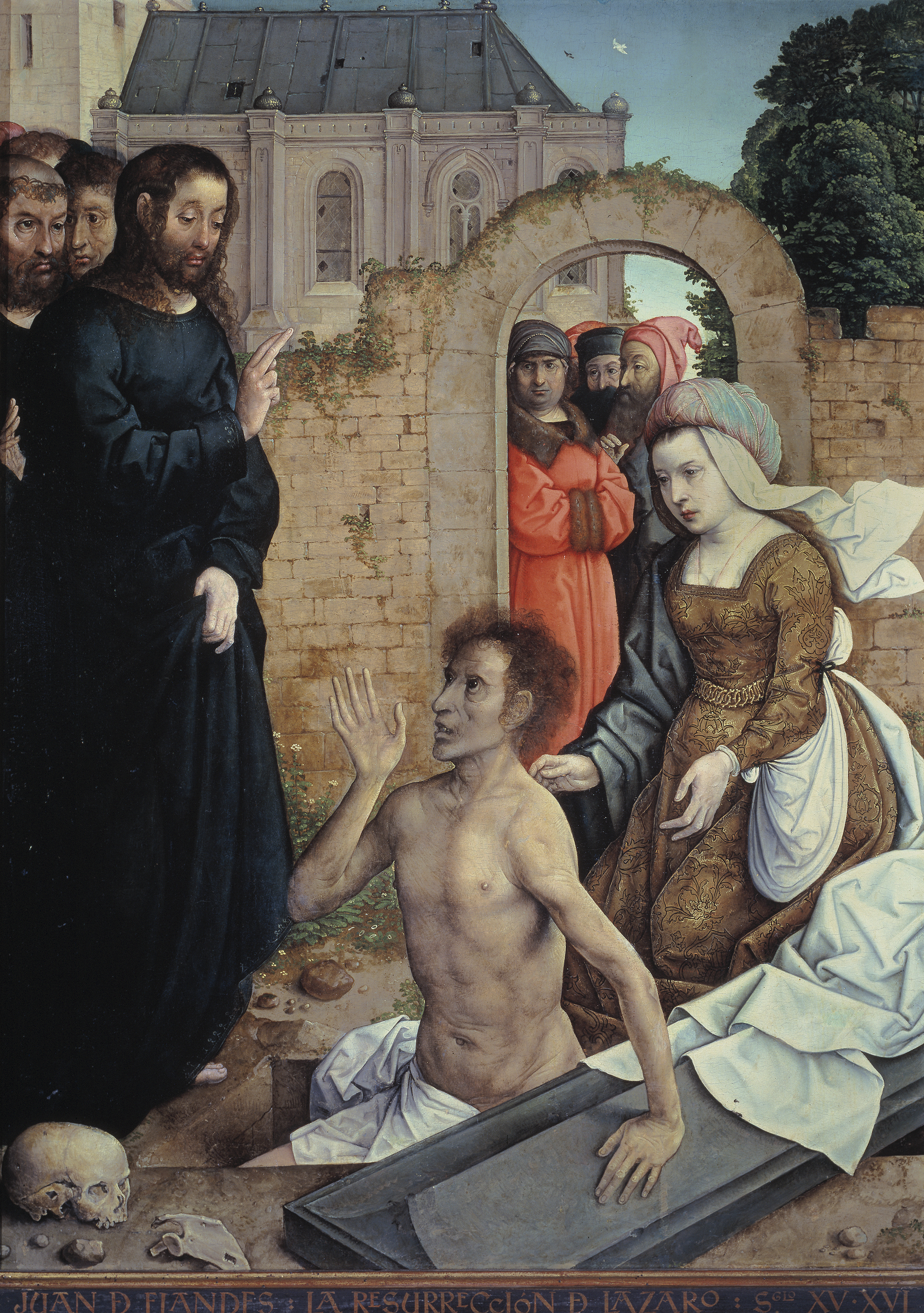 La obra representa a Jesucristo resucitando a Lázaro de Betania de entre los muertos.